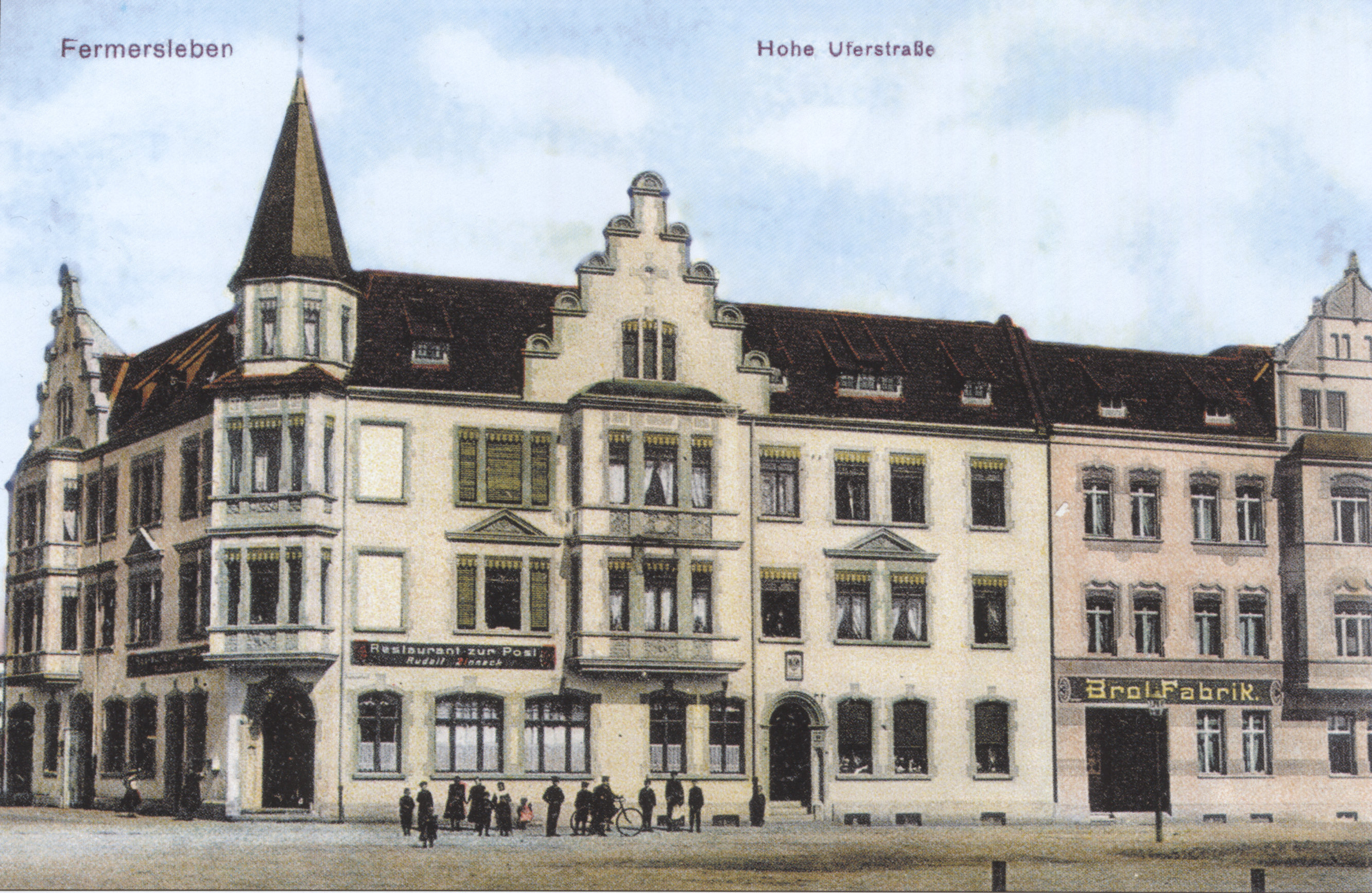 Blick auf die heutige Ecke Alt Fermersleben / Hohe Uferstraße